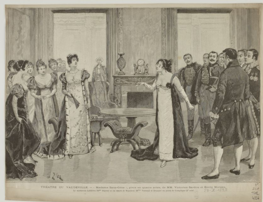 Scène du 2e acte, Mme Lefebvre (Mlle Réjane) et les soeurs de Napoléon. (1893)